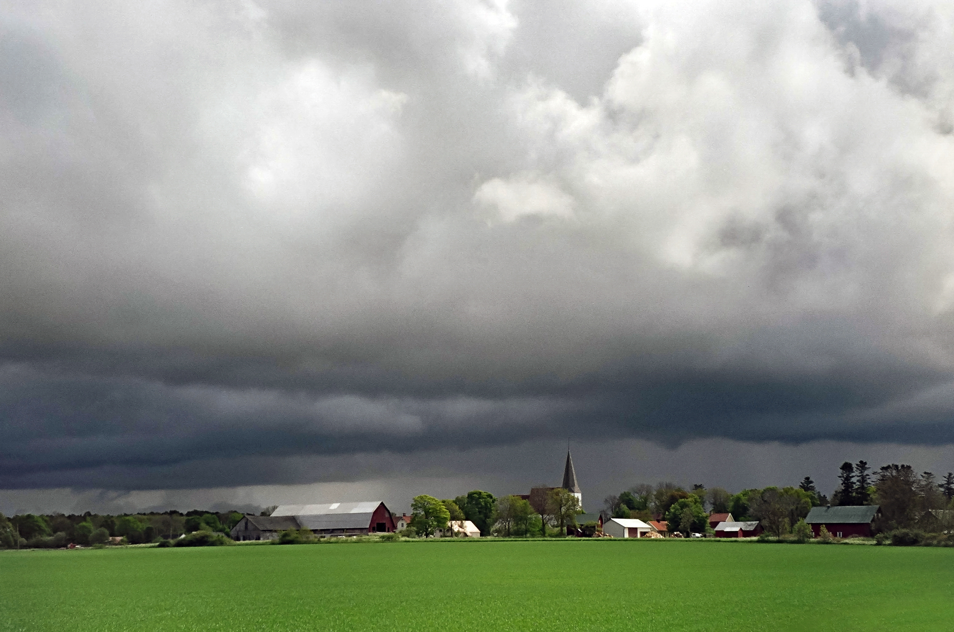 Regn över Martebo och kyrkan där, Gotland, Sverige